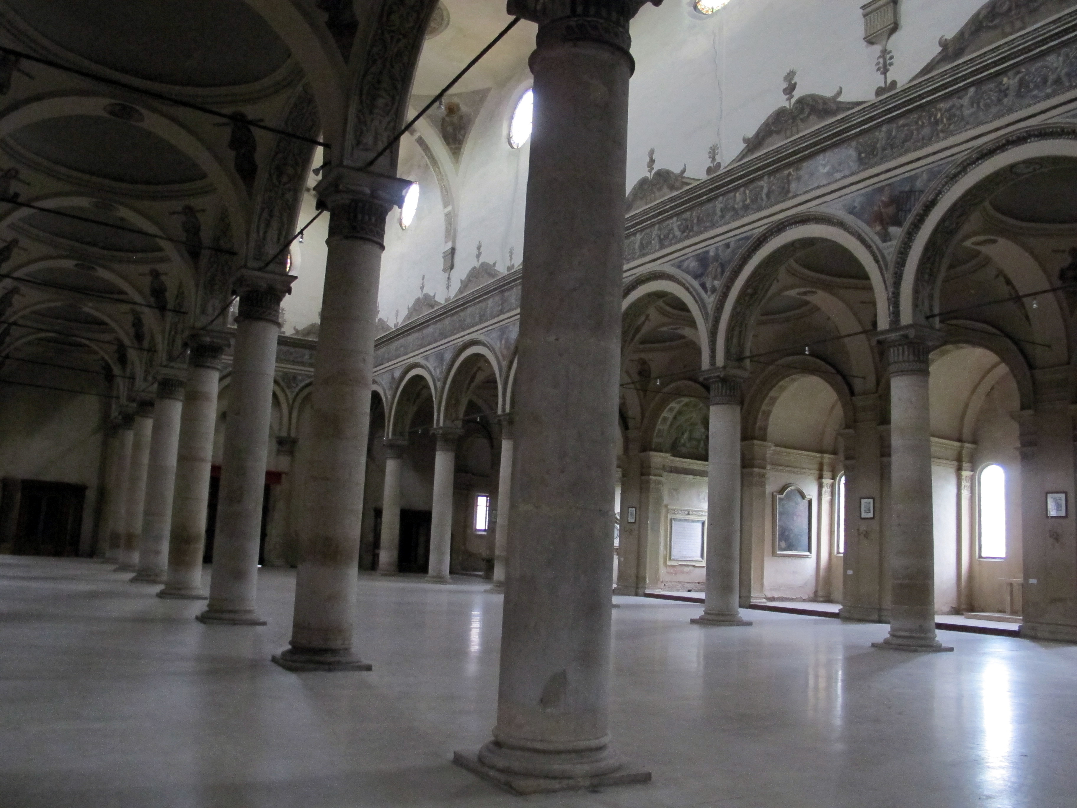 Ferrara